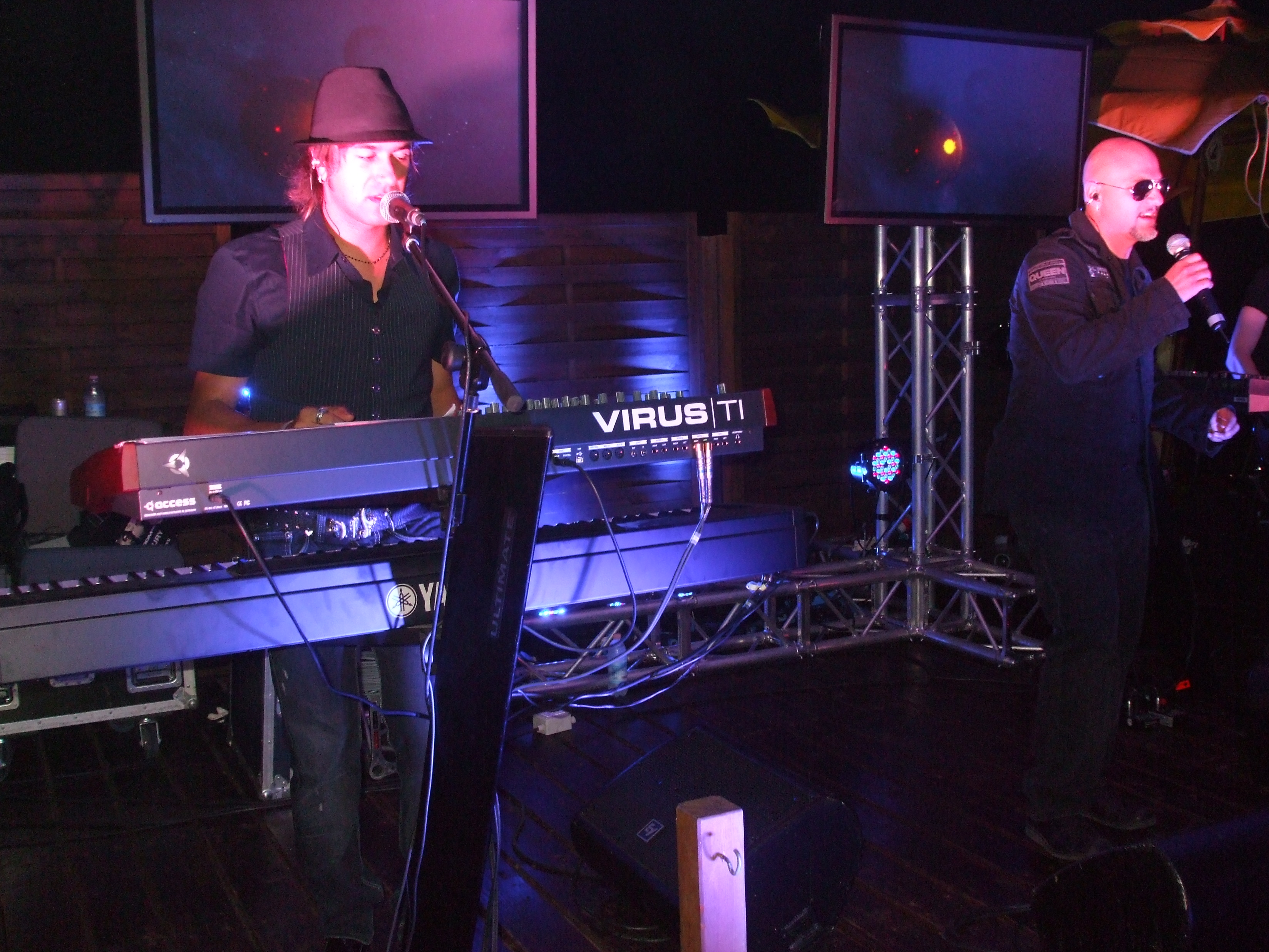 Bloom 06 Showcase, Ostia